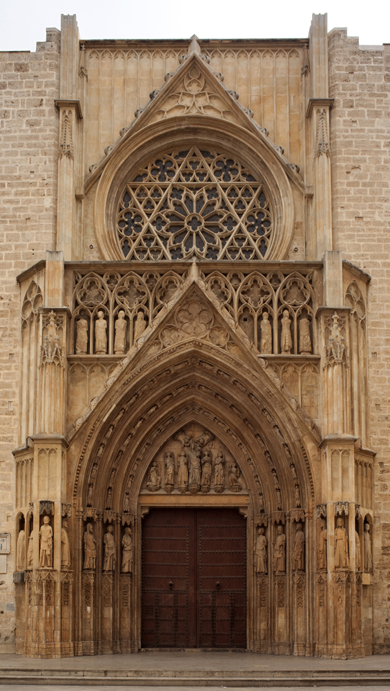 Cultural Heritage Spain